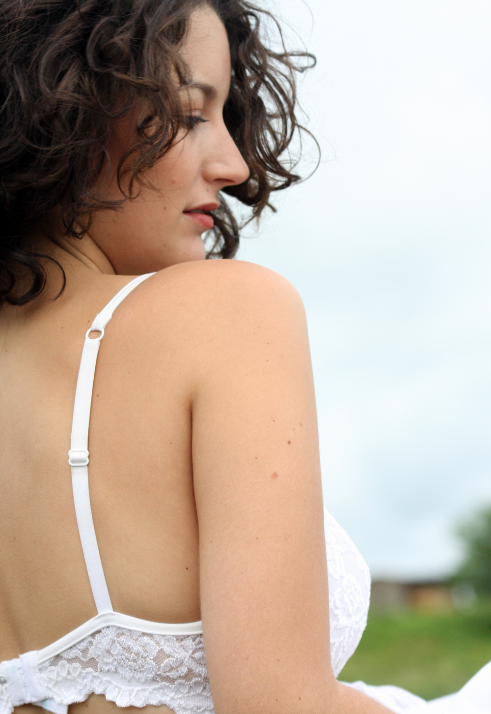 Sara_1593